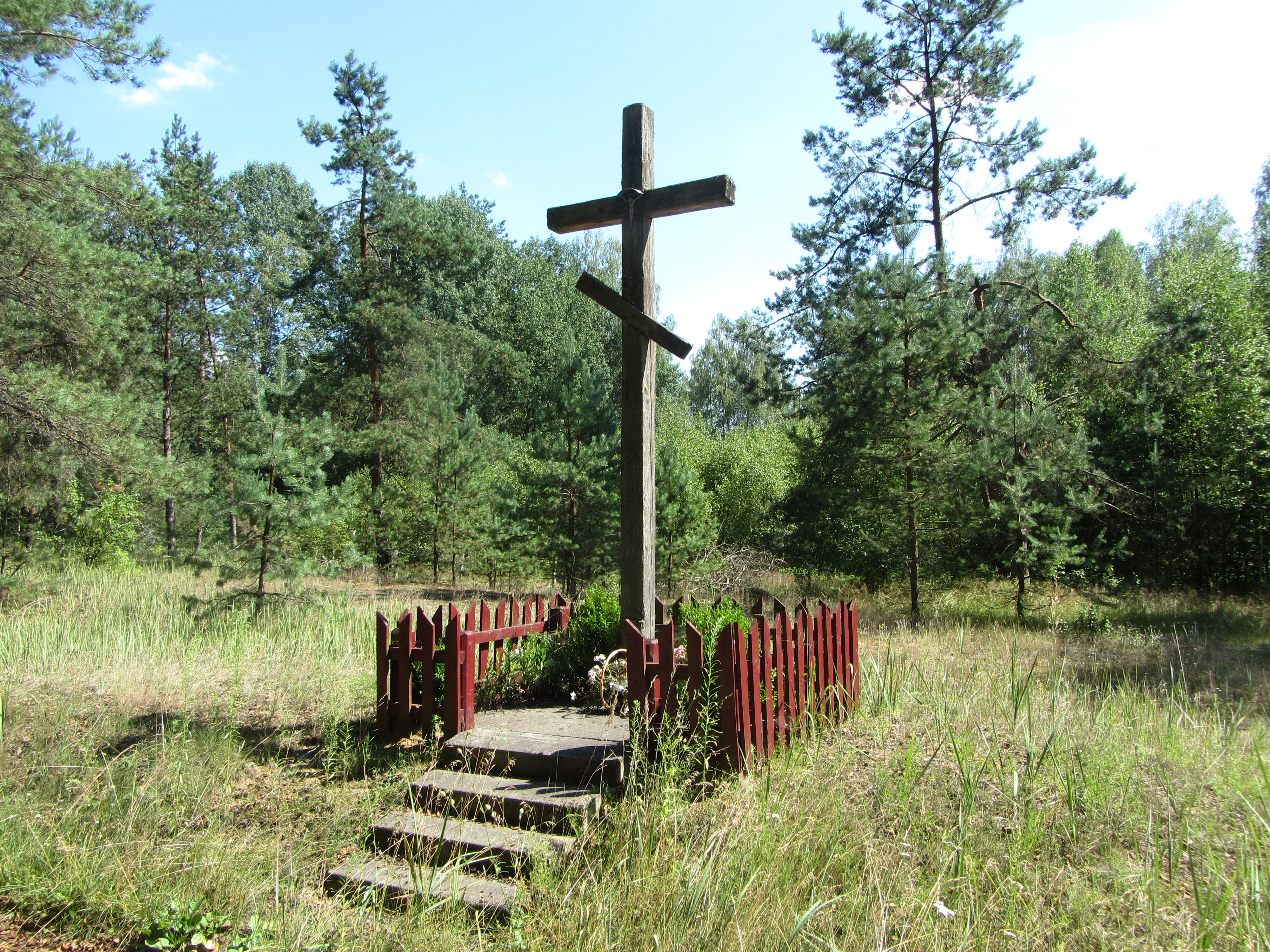 Kaniavos sen., Lithuania